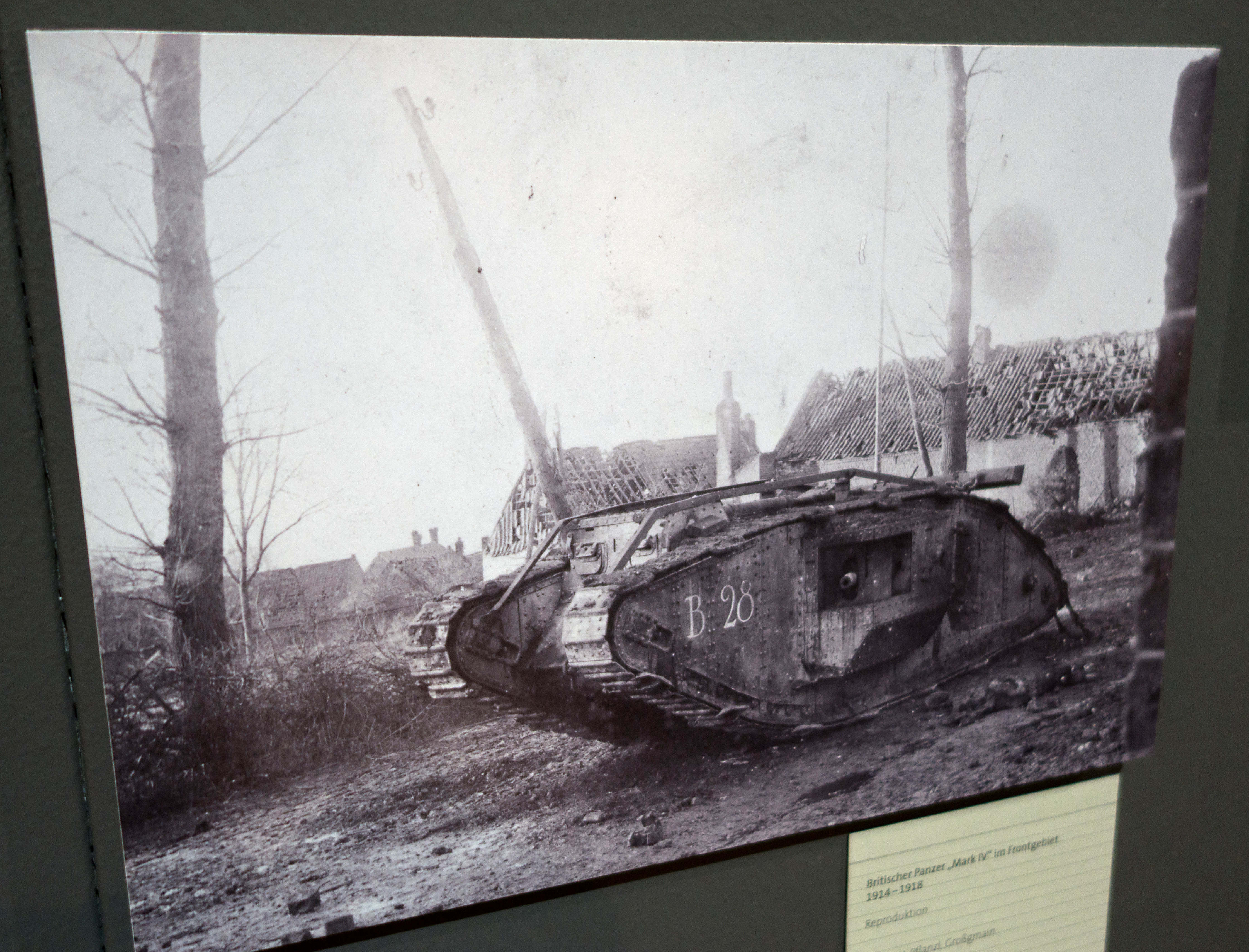 Mark IV Panzer. Ausstellung Krieg.Trauma.Kunst.Salzburg und der Erste Weltkrieg im Salzburg Museum in der Neuen Residenz in Salzburg.